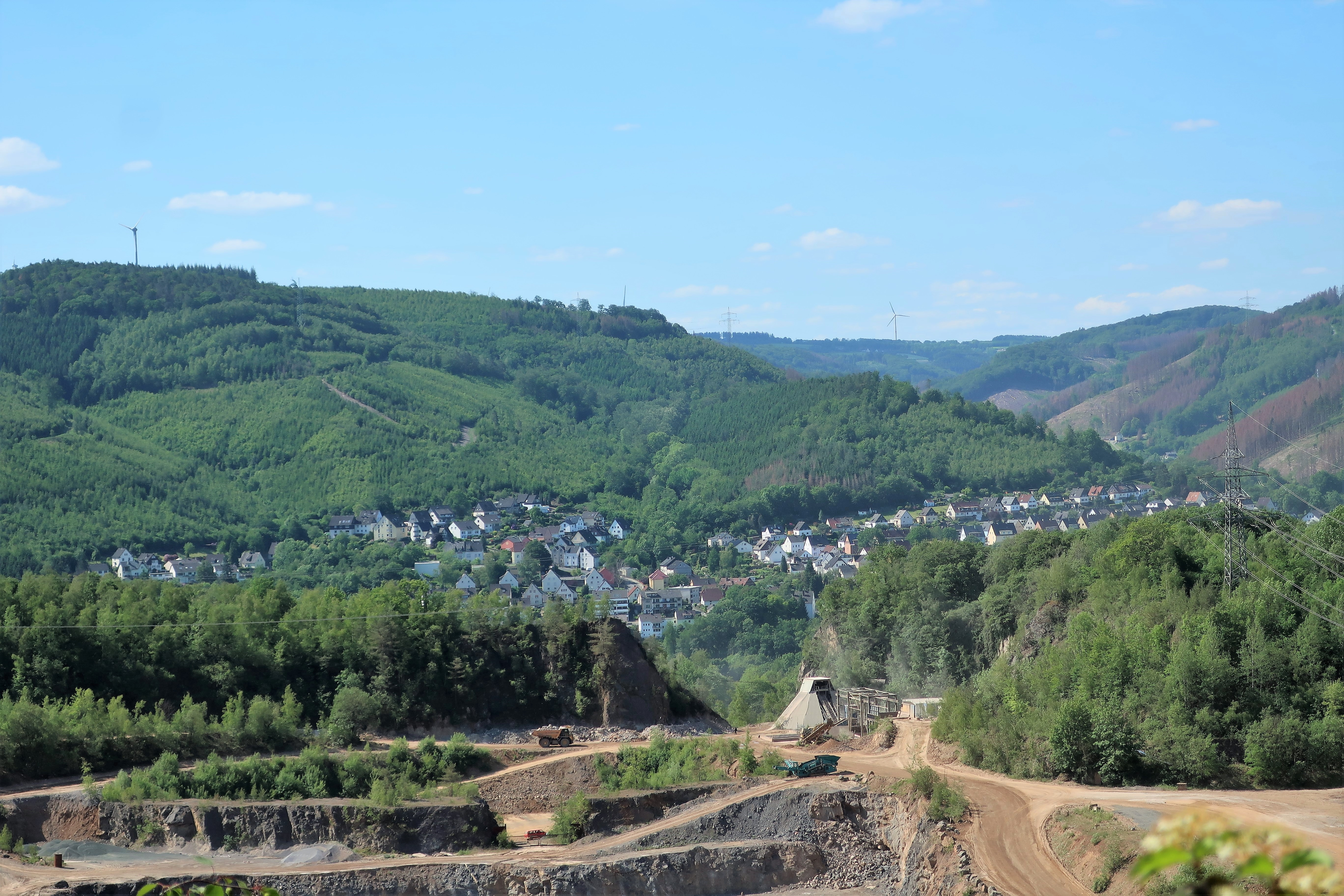 Landschaftsschutzgebiet „Roter Stein, Zimmerberg“ in Hagen-Hohenlimburg. Das große im Hintergrund liegende Waldgebiet mit wertvollem Baumbestand, östlich des Nahmertals (rechts), zwischen Lenne und Lahmen Hasen, ist mit zahlreichen Bächen durchzogen. Höchste Erhebungen: Zimmerberg (320 m) und Roter Stein (271 m). Vorne Steinbruch der Hohenlimburger Kalkwerke auf dem Gegenhang.